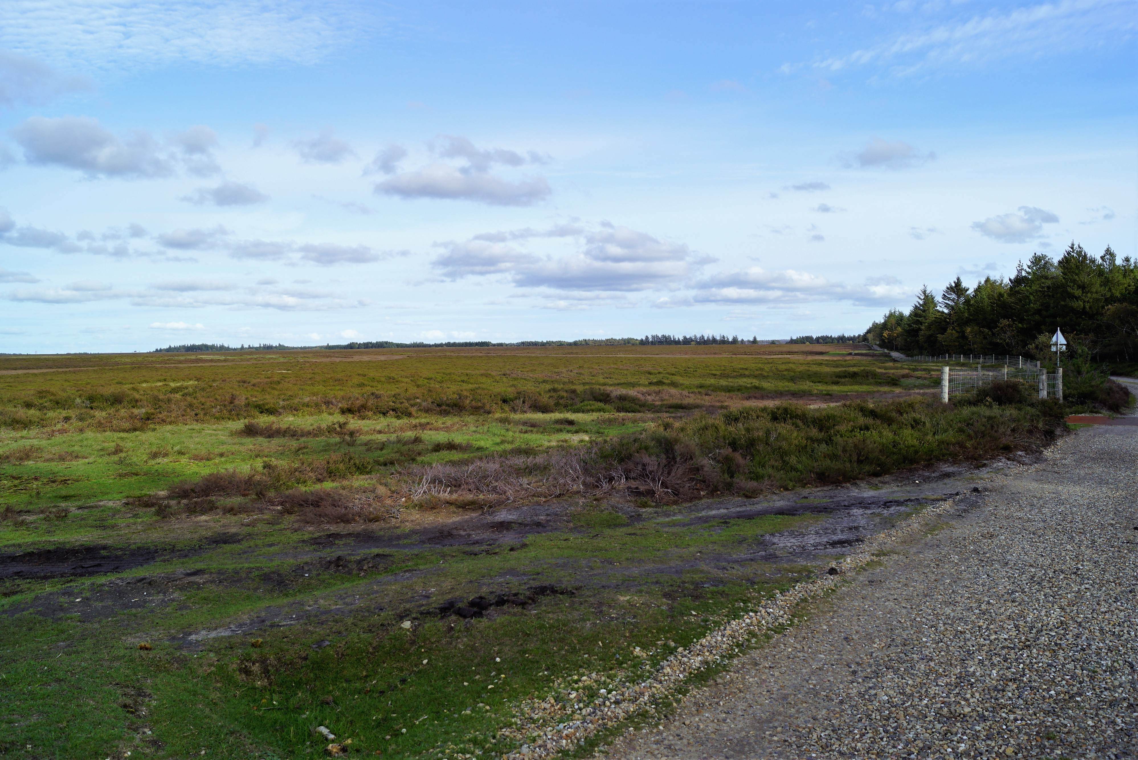 Hjelm Hede set mod øst